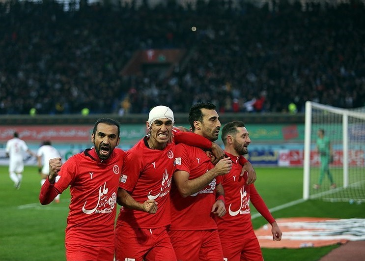 مازِرونی: نساجی و پدیده کا؛ فصل 97-98 رفت دوره شنه